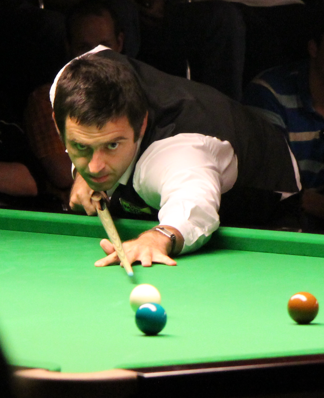 Ronnie O'Sullivan beim Paul Hunter Classic 2011